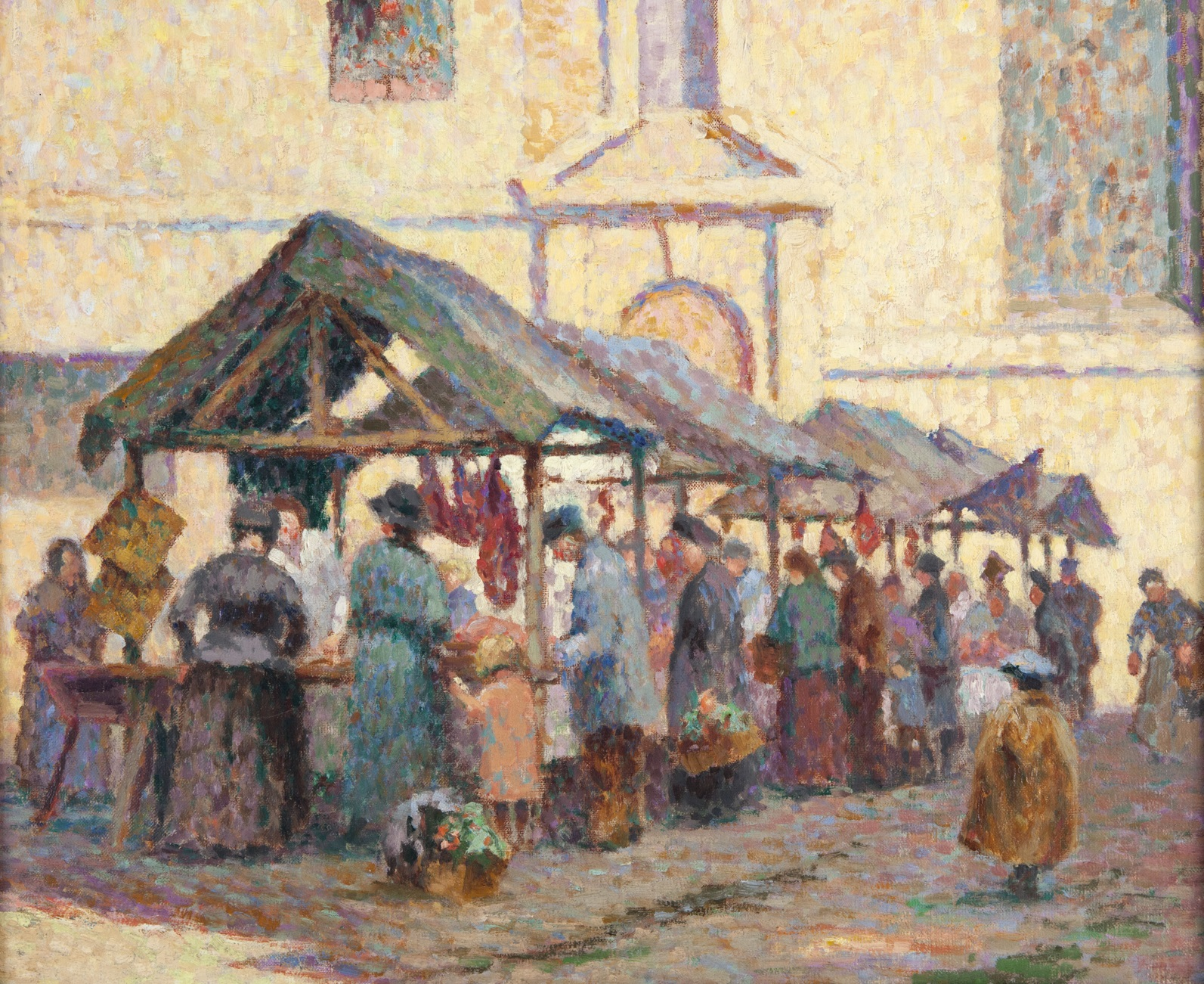 Marché à Pont-l'Évêque